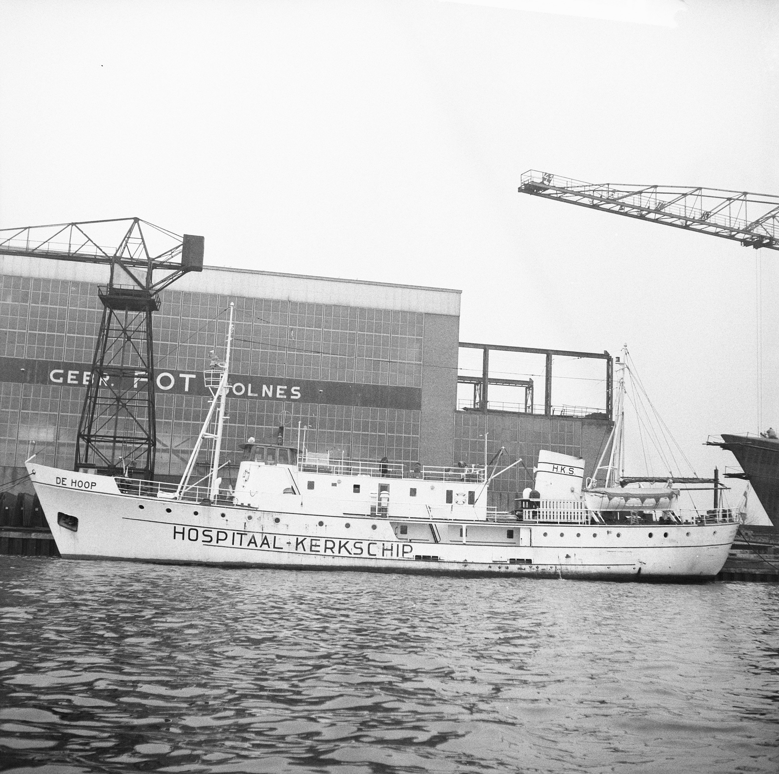 Collectie / Archief : Fotocollectie Anefo Reportage / Serie : [ onbekend ] Beschrijving : Hospitaalschip "De Hoop" te koop aangeboden Datum : 24 maart 1964 Trefwoorden : hospitaalschepen Fotograaf : Smulders, Jean / Anefo Auteursrechthebbende : Nationaal Archief Materiaalsoort : Negatief (zwart/wit) Nummer archiefinventaris : bekijk toegang 2.24.01.03 Bestanddeelnummer : 916-2216